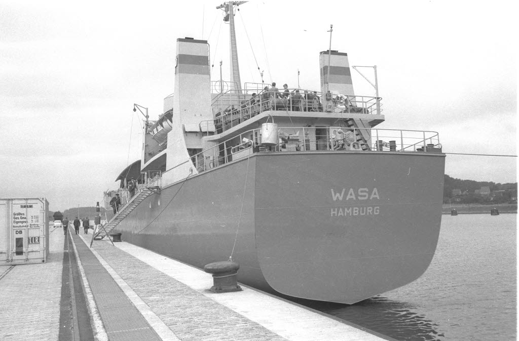 im Nordhafen. Sie fährt als Güterfähre der Teamline Reederei auf der Route Kiel - Hamburg - Stockholm.